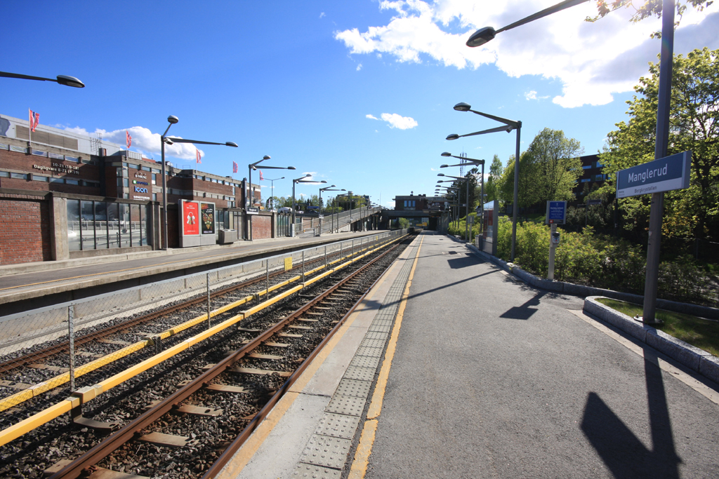 Manglerud T-banestasjon. Oversiktsbilde fra vestenden på Spor 1.